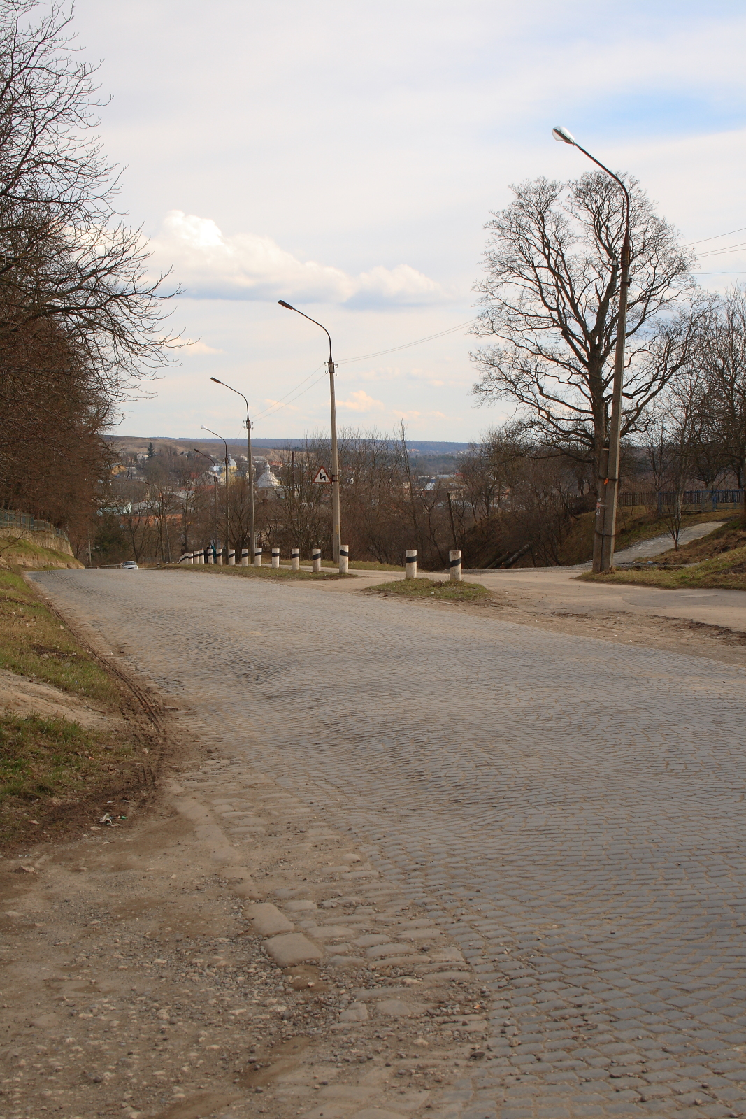 Микулинці